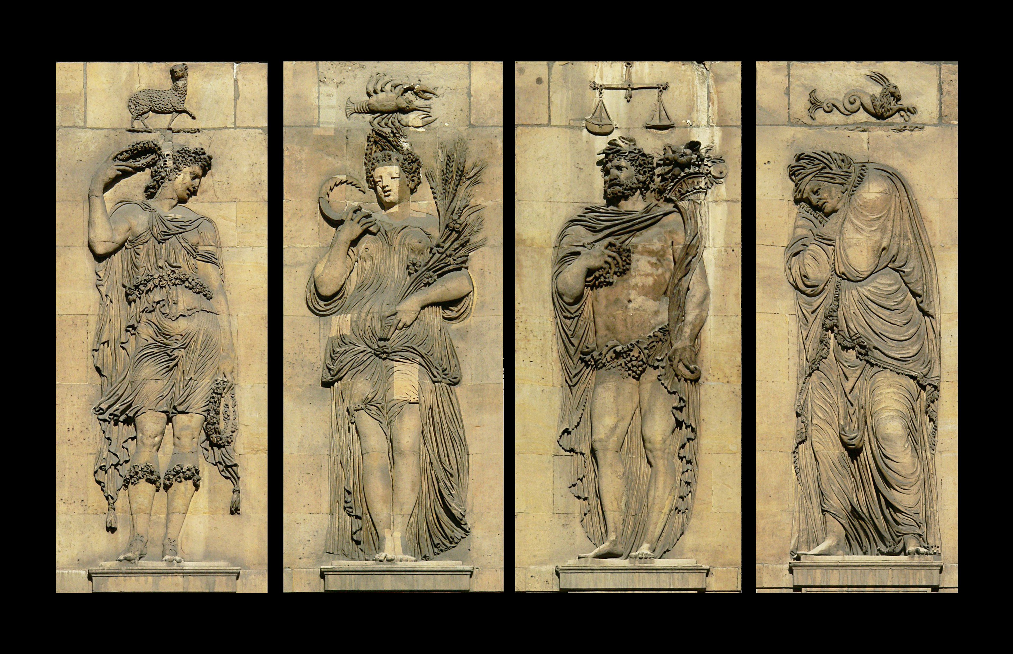 Hôtel Carnavalet, Paris. Les Quatre Saisons . Sculpteur : Jean Goujon